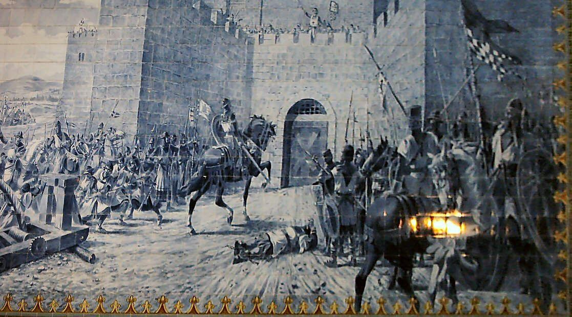 Painel alusivo ao feito de Gil Pais sito na Praça 5 de Outubro em Torres Novas, distrito de Santarém, Portugal. De autoria de Jorge Colaço, foi inaugurado em 7 de maio de 1939.